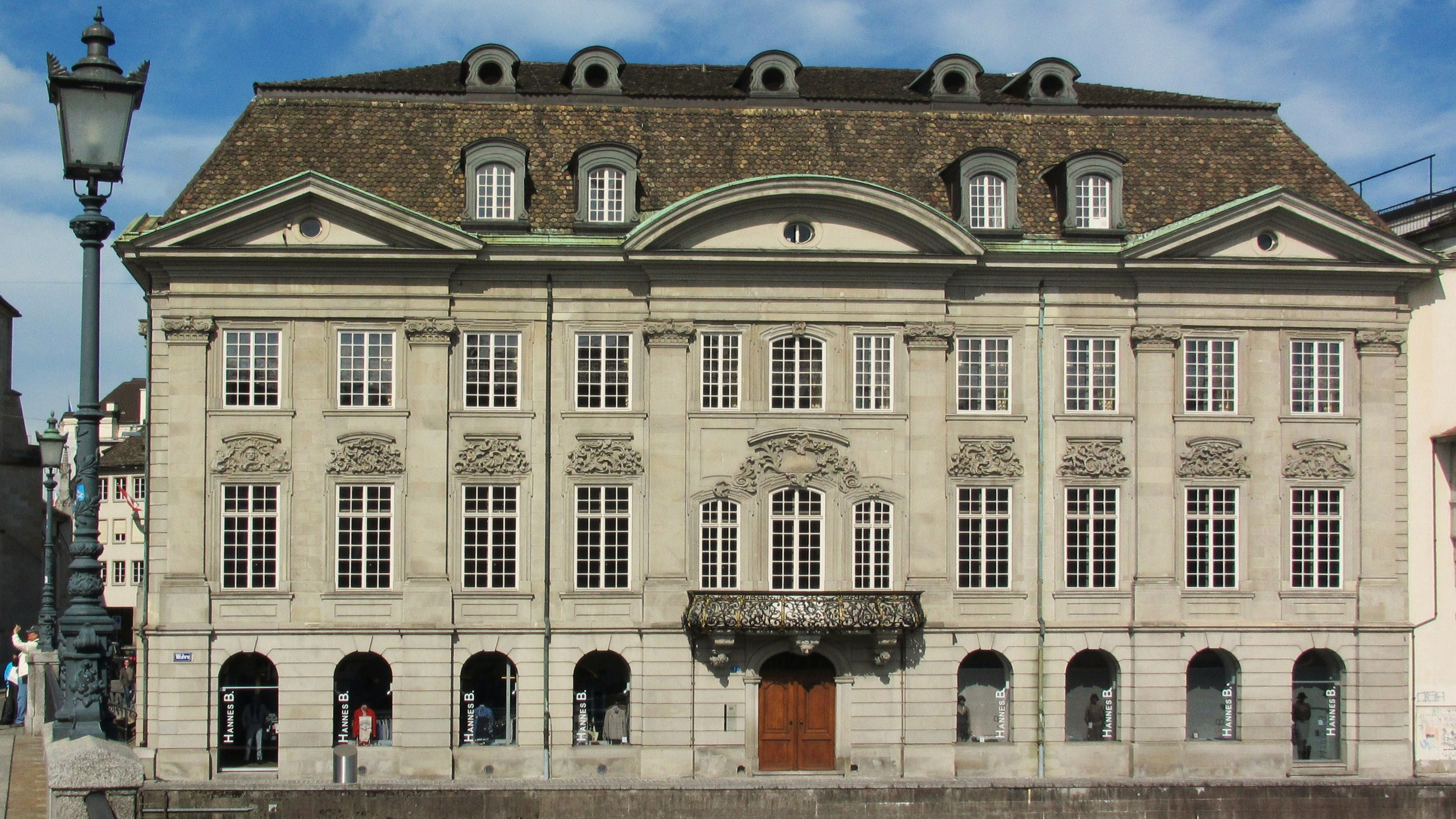 Zürich, Zunfthaus zur Miese, Münsterhof.20